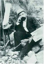 Catalonian painter Miquel Carbonell i Selva (1854-1896)